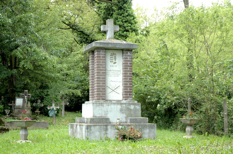 Grave of Püspöky Gráczián (Pusztaszentlászló, Zala county, Hungary)